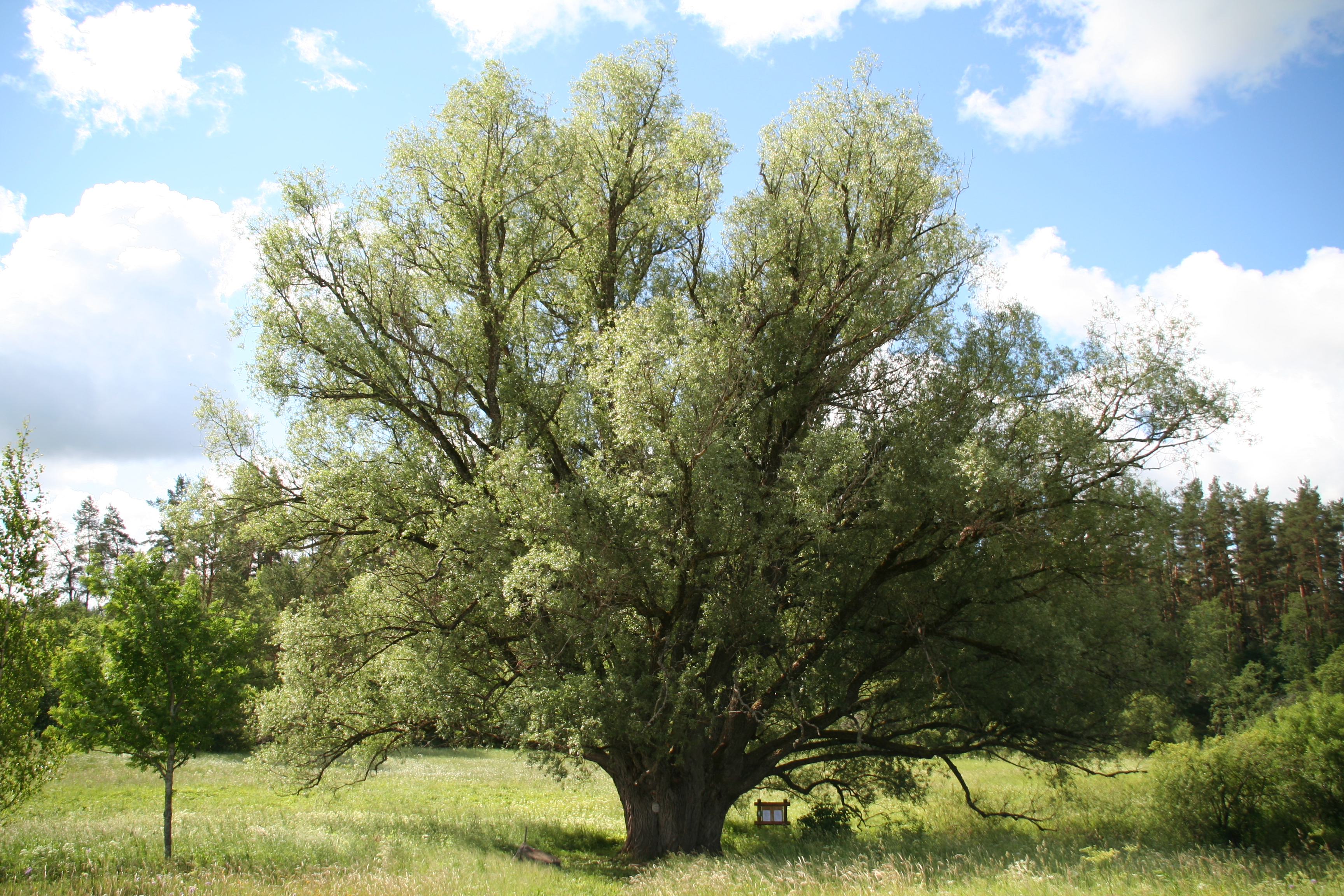 Vītols pie Apes